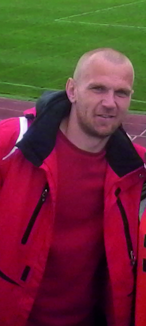 Алдин Джидич